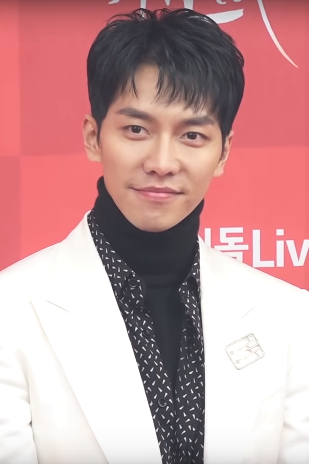 MC 이승기(LEESEUNGGI)와 박민영(PARKMINYOUNG)이 1월 5일 오후 서울 구로구 고척스카이돔에서 열린 '제33회 골든디스크(Golden Disc Awards) 디지털 음원 부문 시상식' 레드카펫에 참석하여 포즈를 취하고 있다.